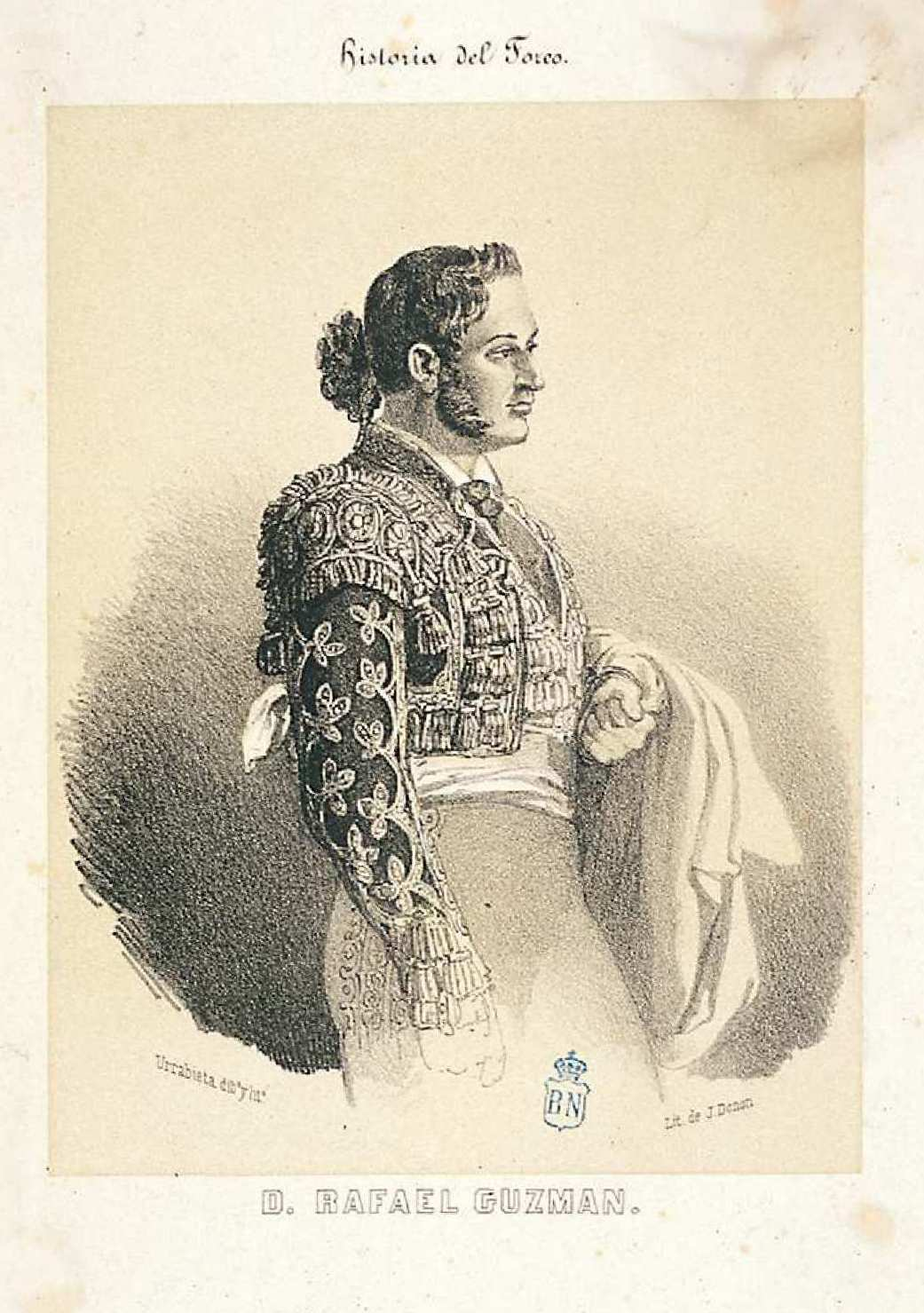 Rafael Pérez de Guzmán, litografía de Vicente Urrabieta. Ilustración de la Historia del toreo y de las principales ganaderías de España de F. G. de Bedoya, Madrid, 1850.